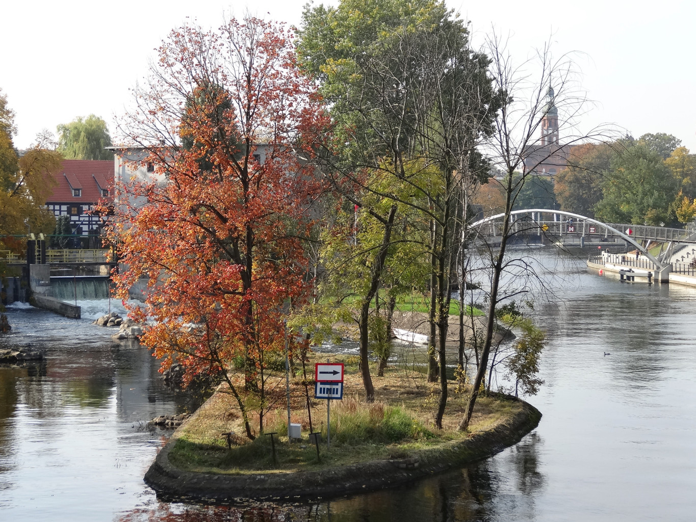 Wyspa św. Barbary na Brdzie w Bydgoszczy w pobliżu katedry